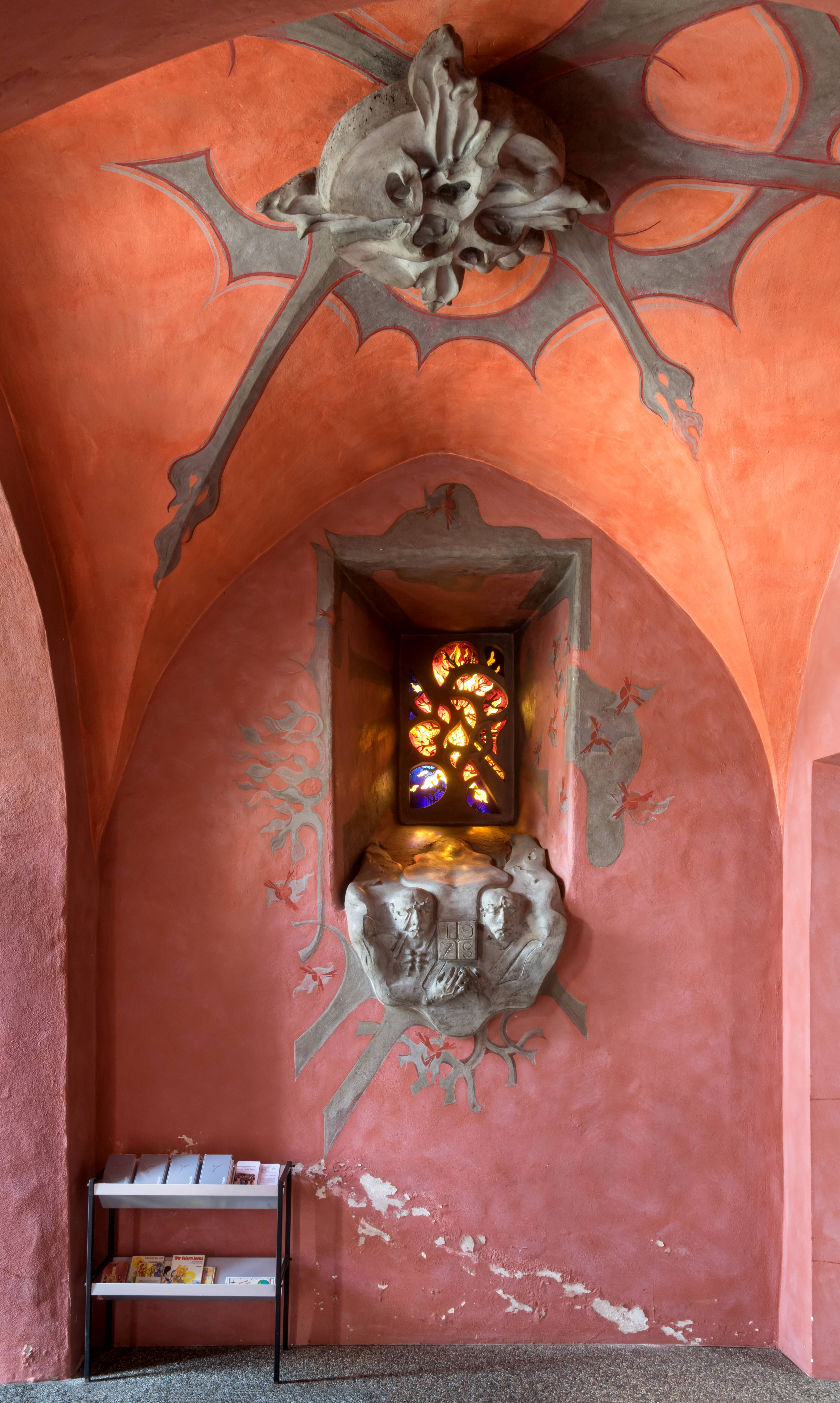 Bilder von St. Columba. in Pfaffenweiler Der Nebeneingang